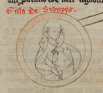 Gisela von Kuenring